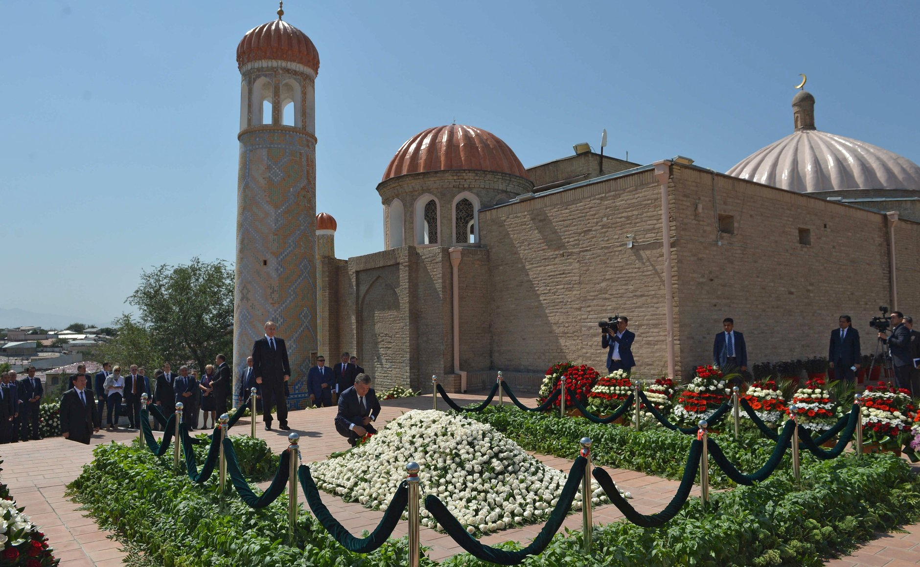 Возложение цветов к месту захоронения Ислама Каримова. Президент России Владимир Путин с Премьер-министром Узбекистана Шавкатом Мирзиёевым